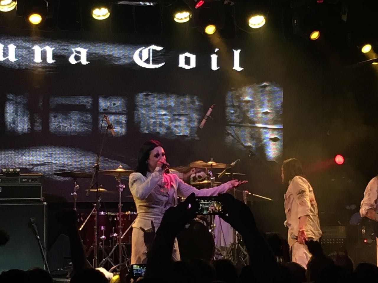 לקונה קויל בהופעה ראשונה בישראל מאי 2017